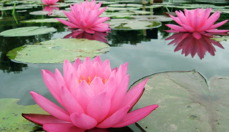 Nénuphars roses